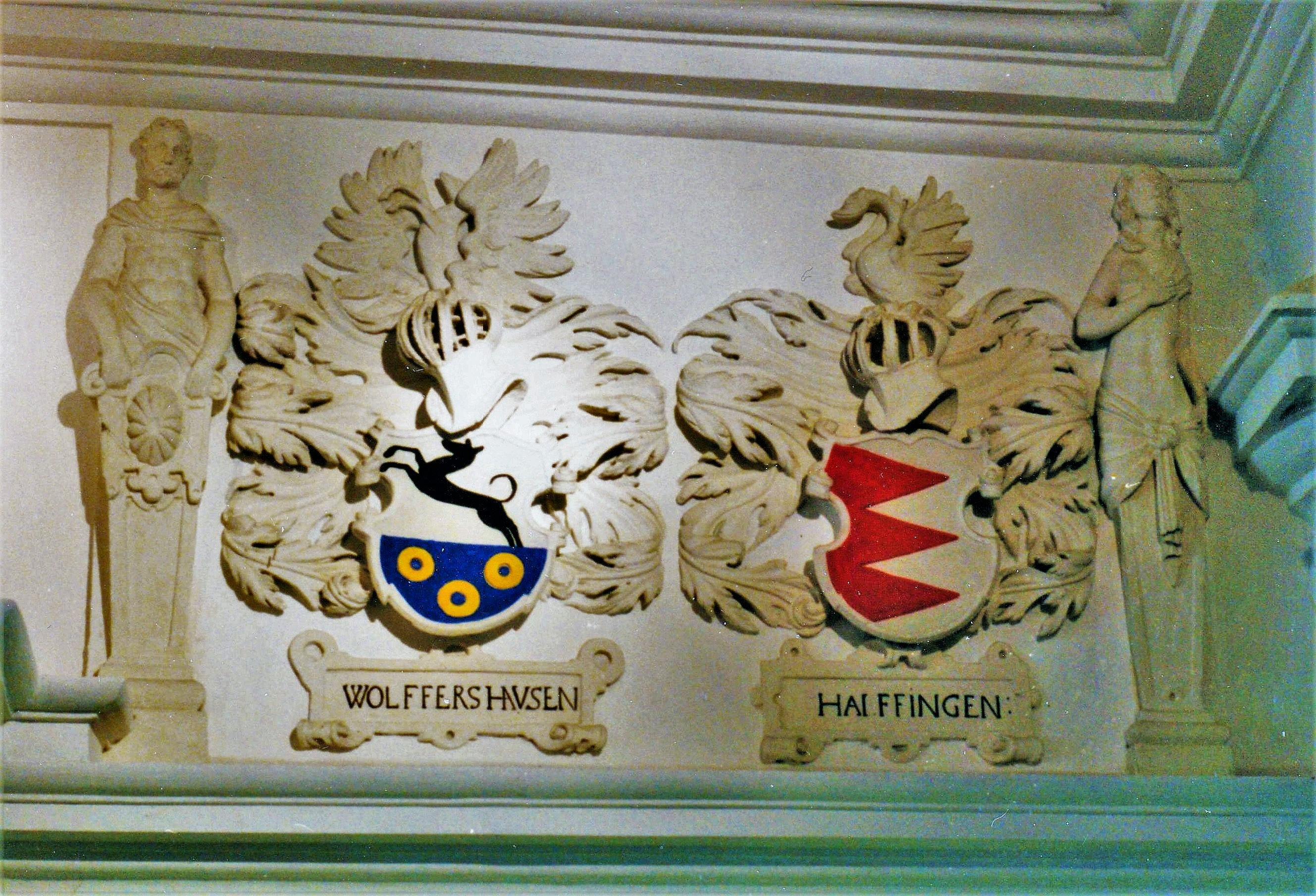 Schloss Grumbach (Rimpar): Wappenfries im Rittersaal (um 1552)